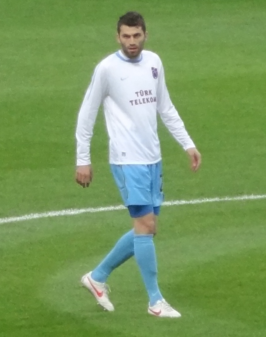 Mustafa Yumlu Galatasaray'a karşı forma giyerken